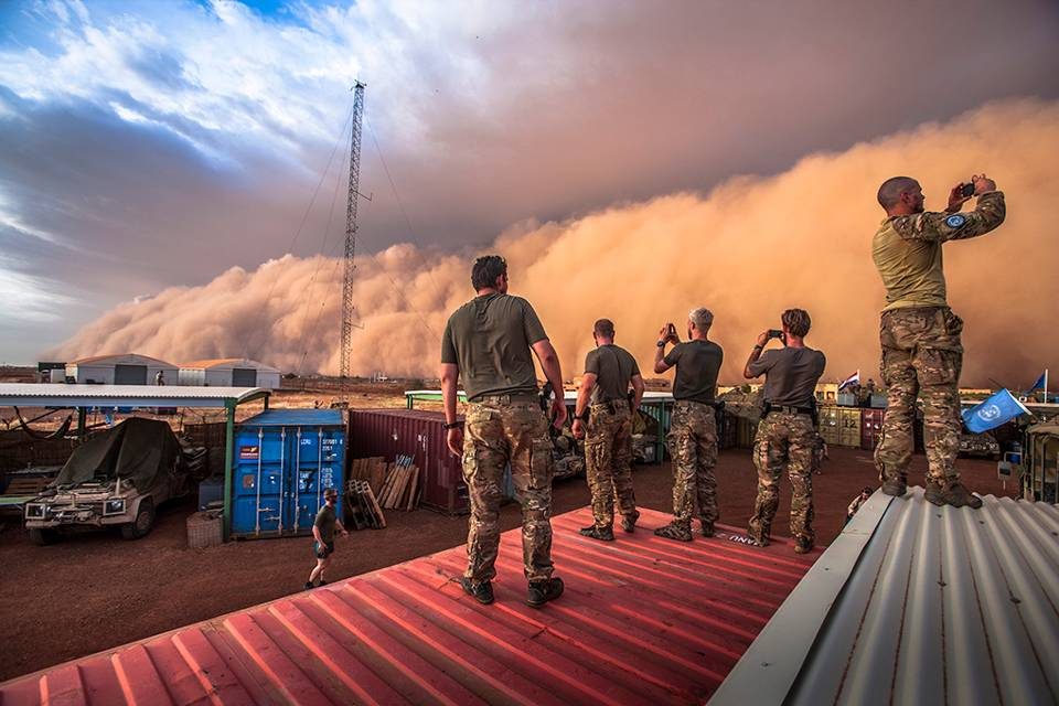 Opname van een onheilspellende zandstorm die op het Nederlandse kamp Castor in Mali afkomt